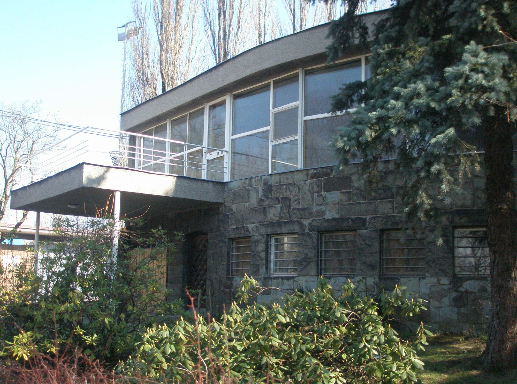 Vila JUDr. Eduarda Lisky